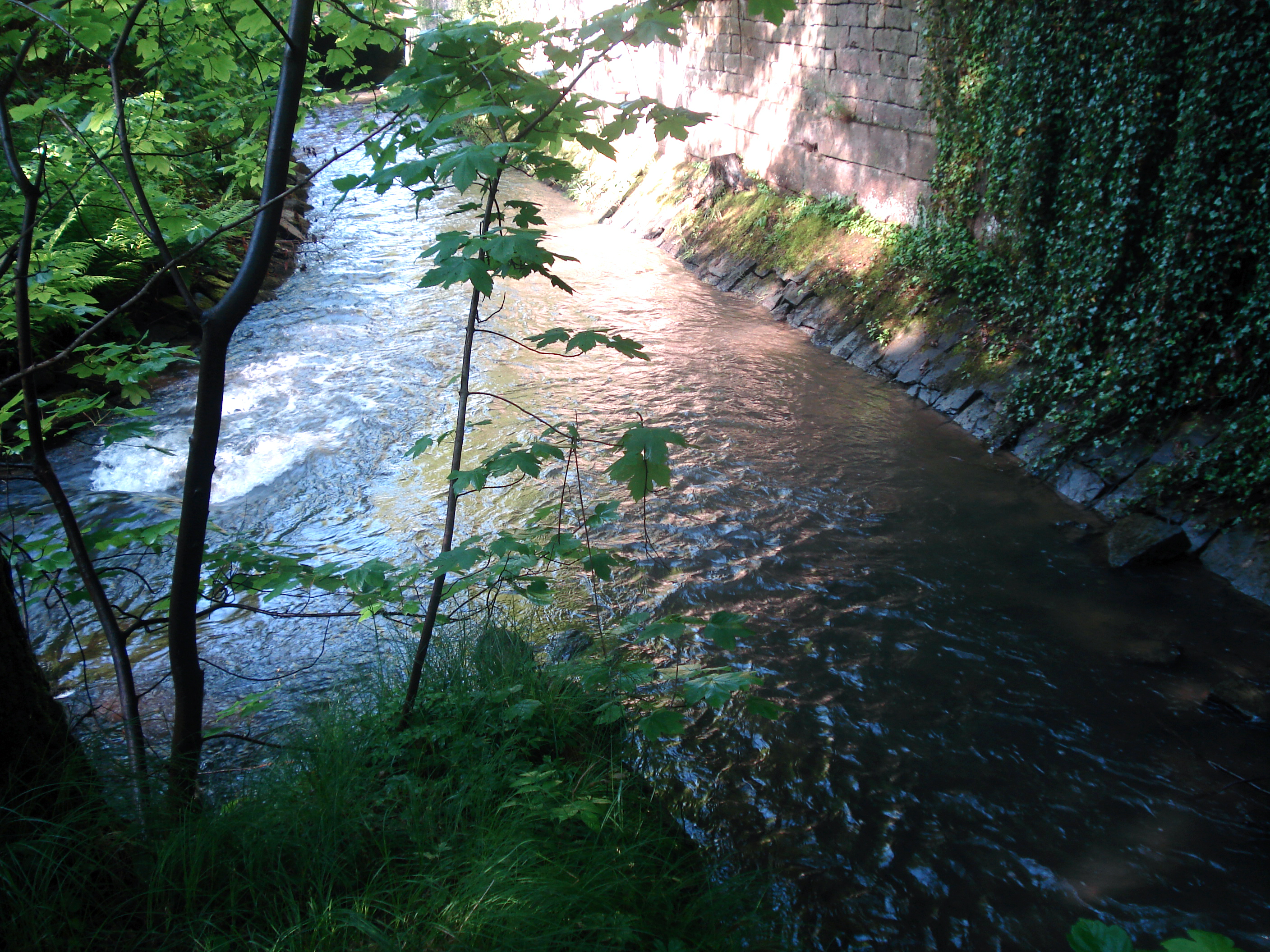 Der Dammbach (links) mündet in die Elsava (rechts)